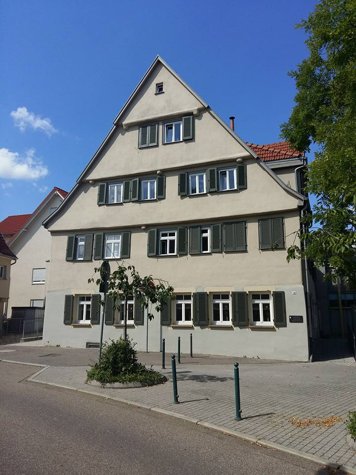 Ehemaliger Gasthof "Adler" in Ditzingen